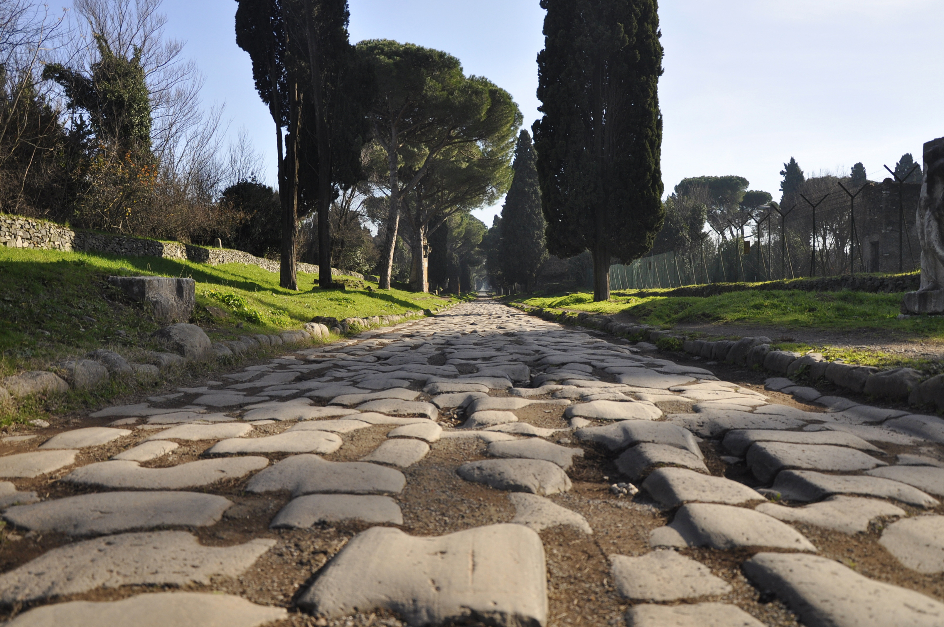 Via Appia Antica te Rome